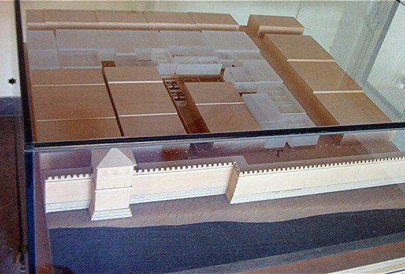 maquette du "quartier magon" de Carthage à l'époque punique